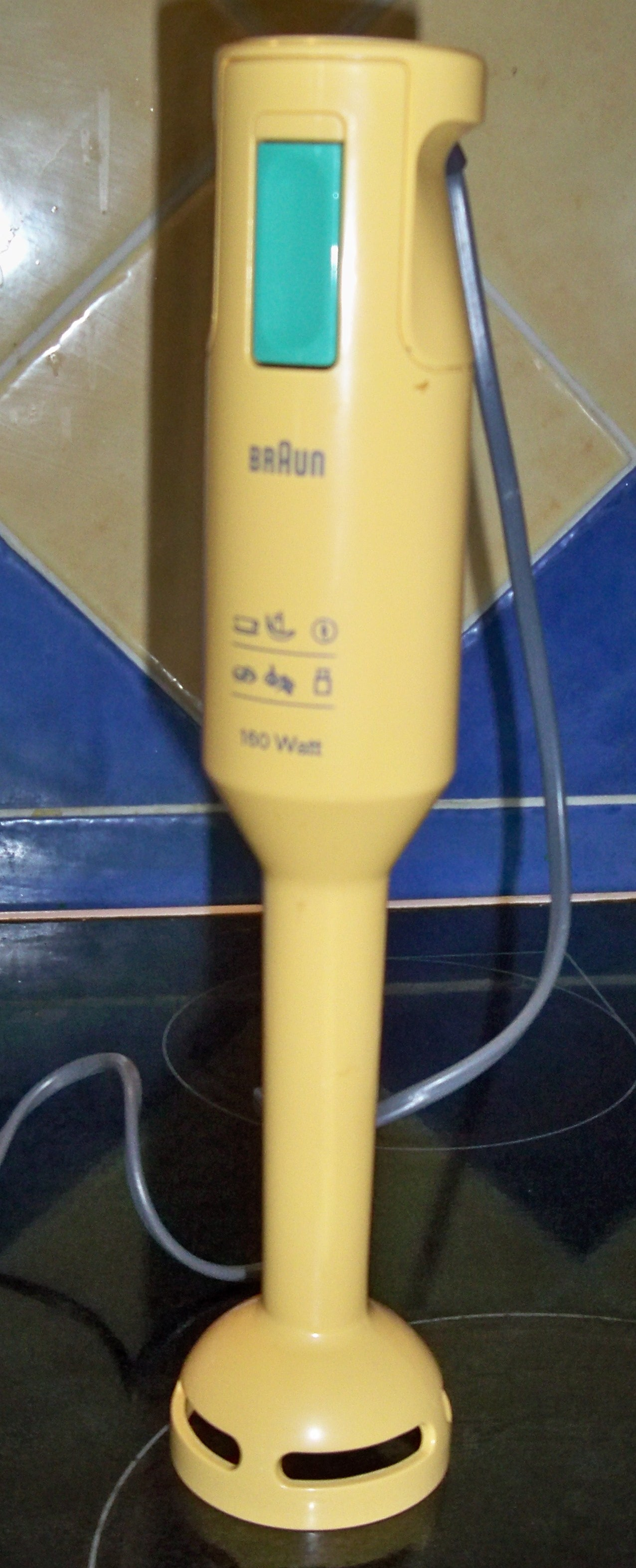 Girafe, ustensile électrique de cuisine, cervant de presse légume